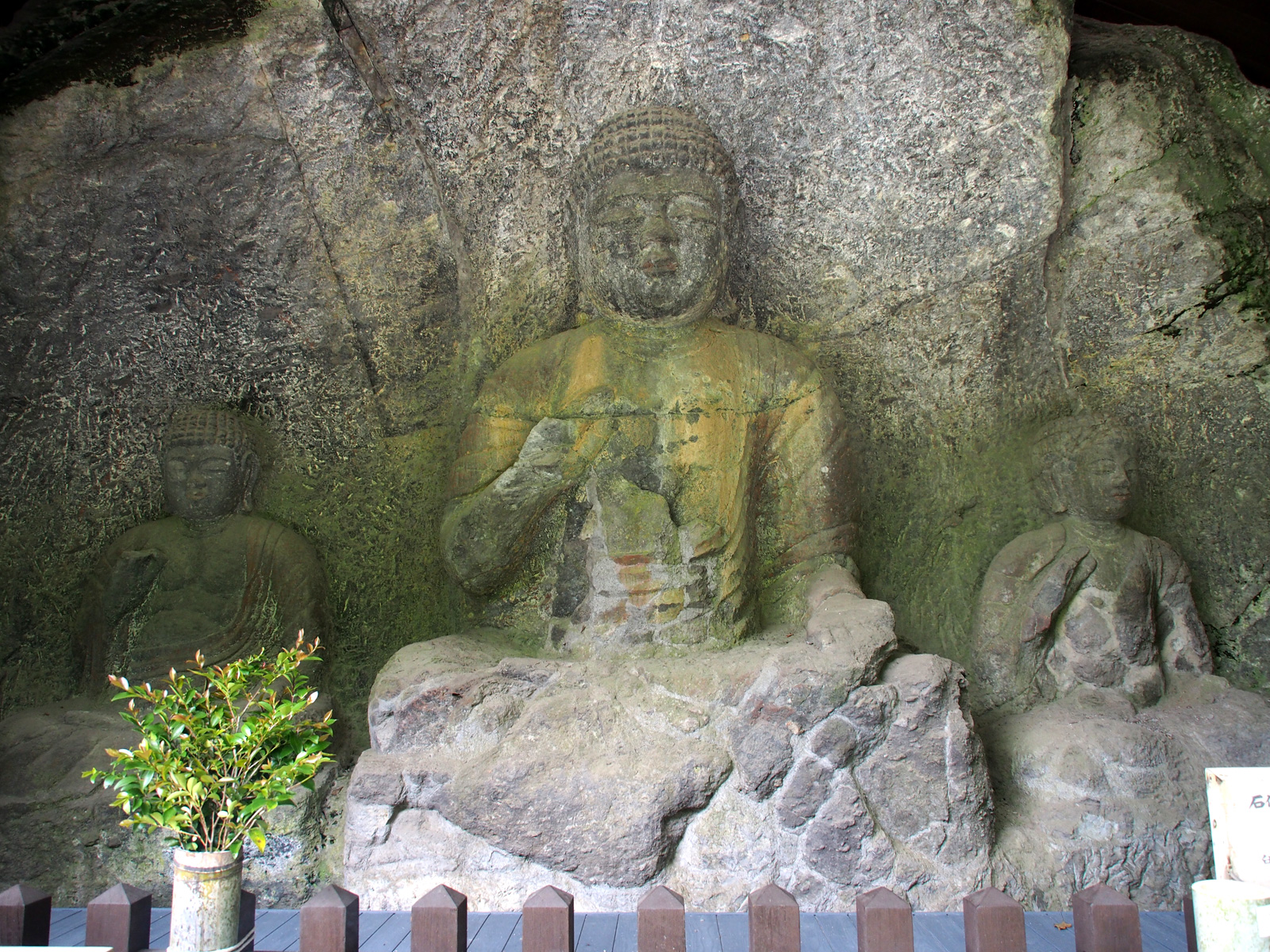 臼杵磨崖仏山王山石仏群（大分県臼杵市）